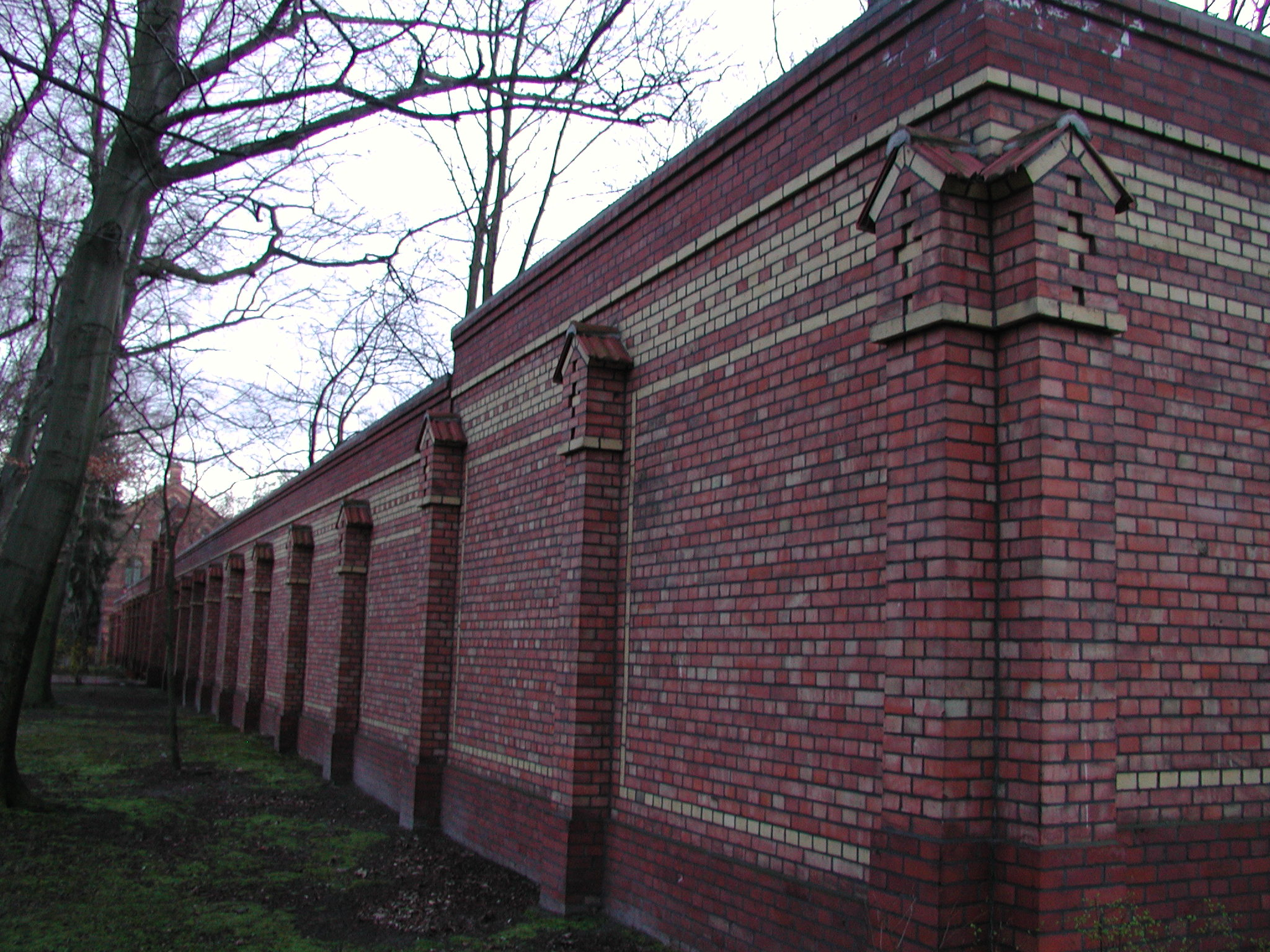 alte Mauer um das Gelände des KEH (2)